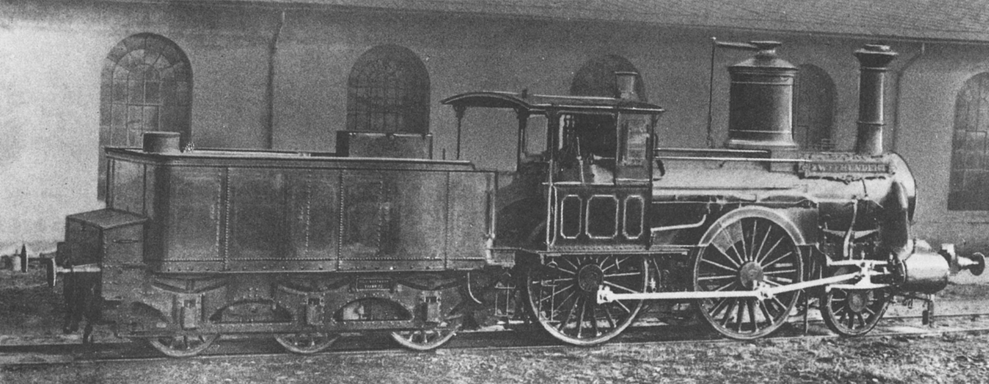 Dampflokomotive Mecklenburgische III.